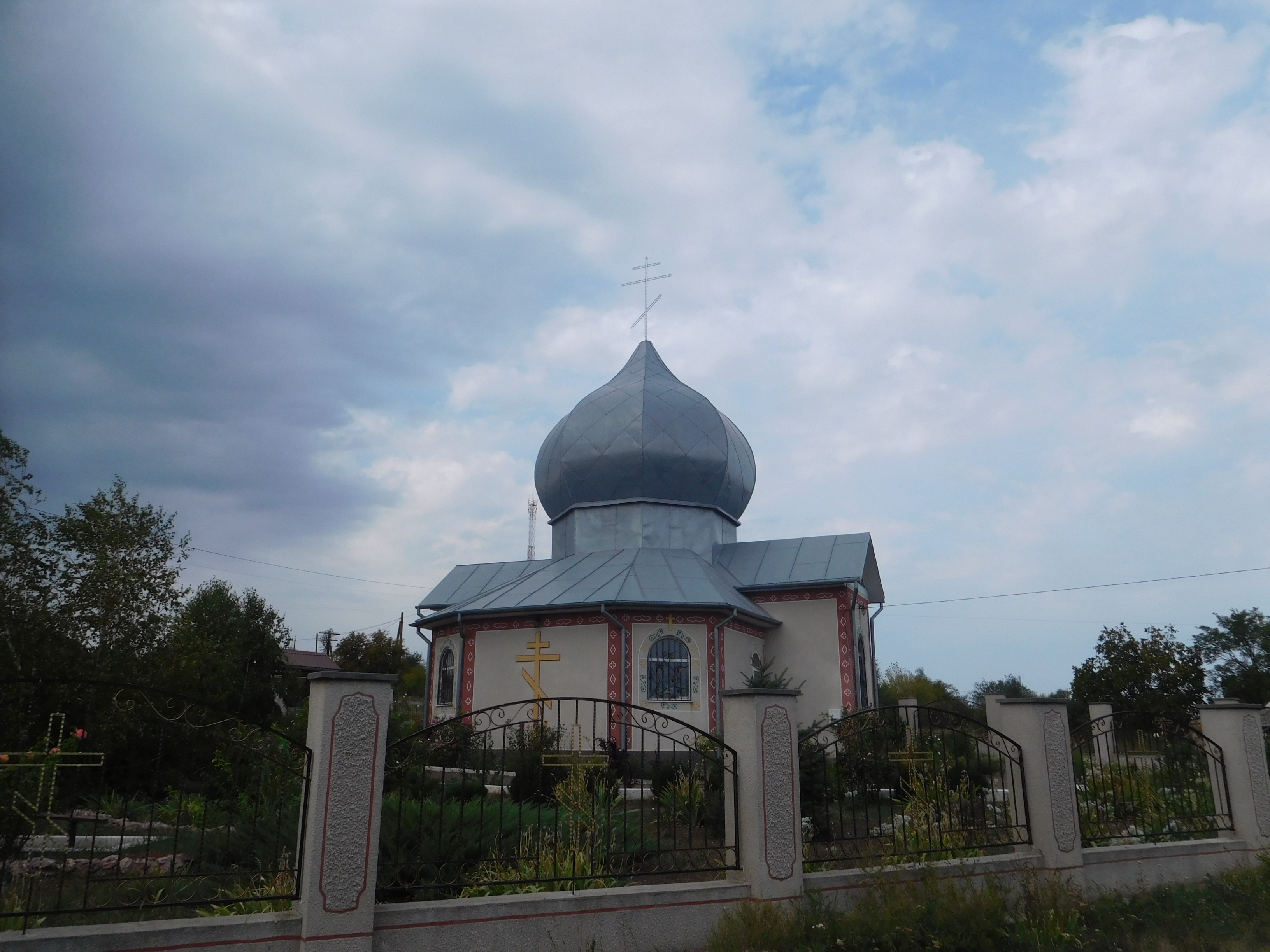 Вікіекспедиція Північ Одещини